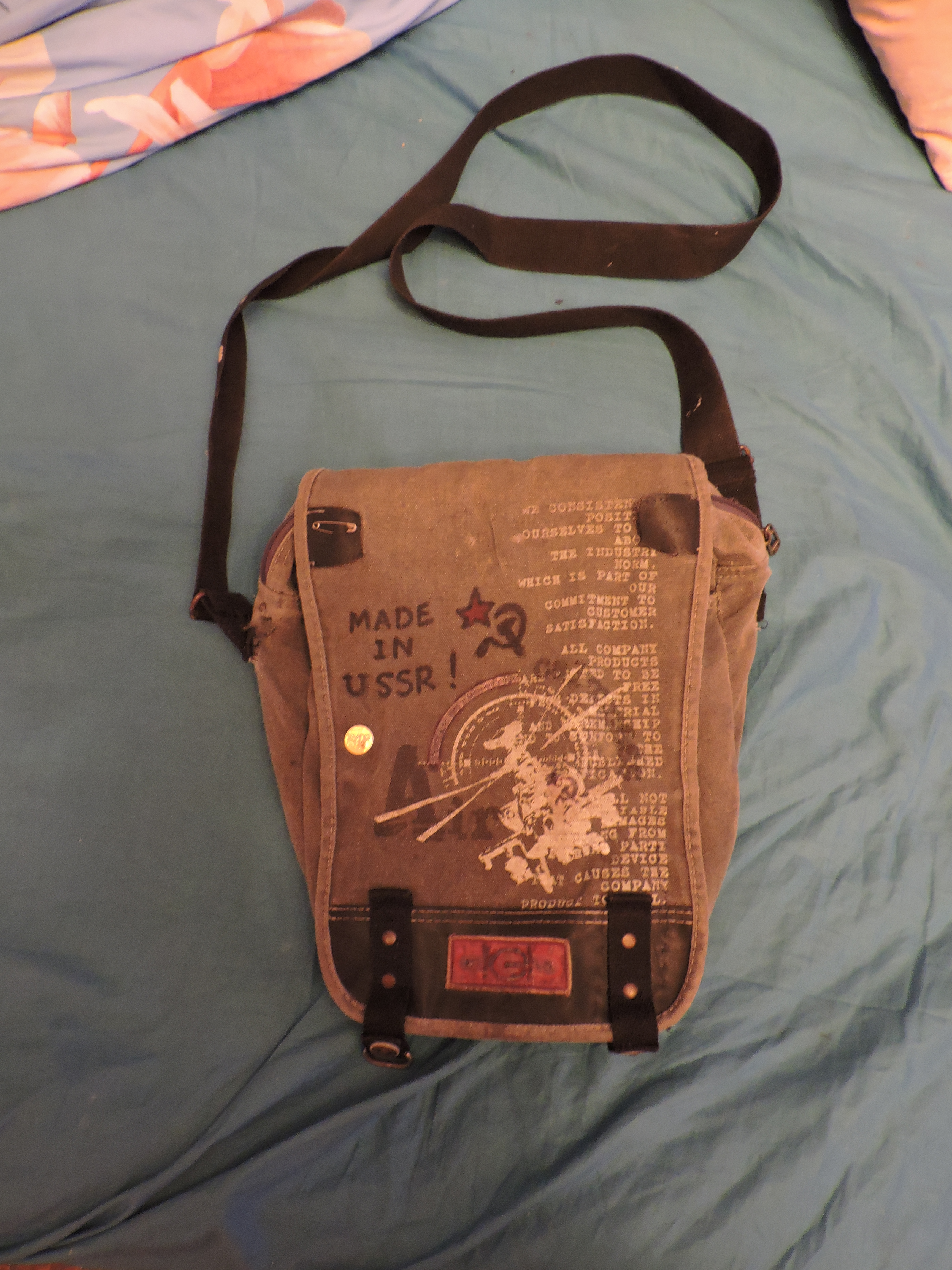 Сумка через плечо, которую я ласково именую саквояжем!!!